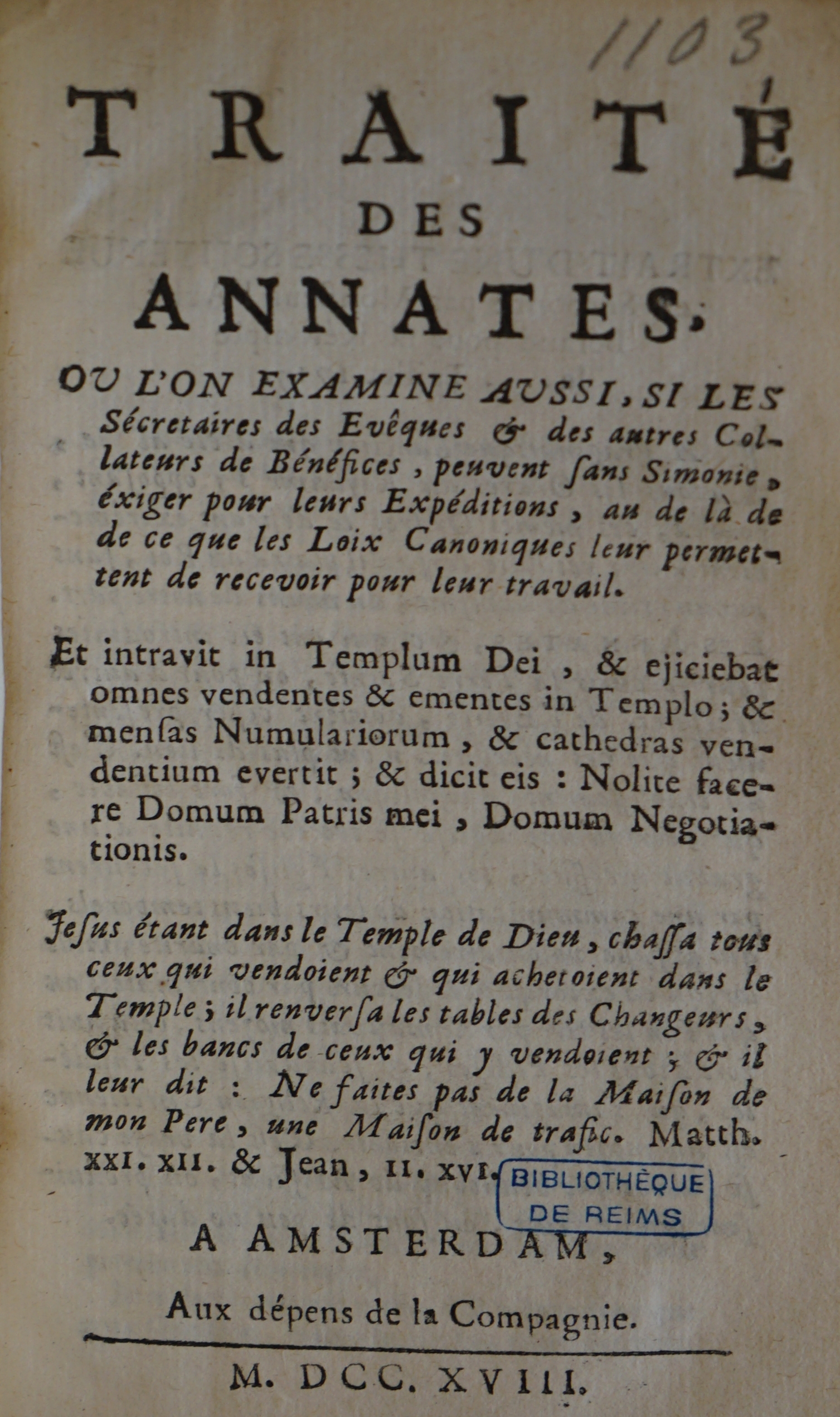 traité sur les bénéfices publié en 1988.